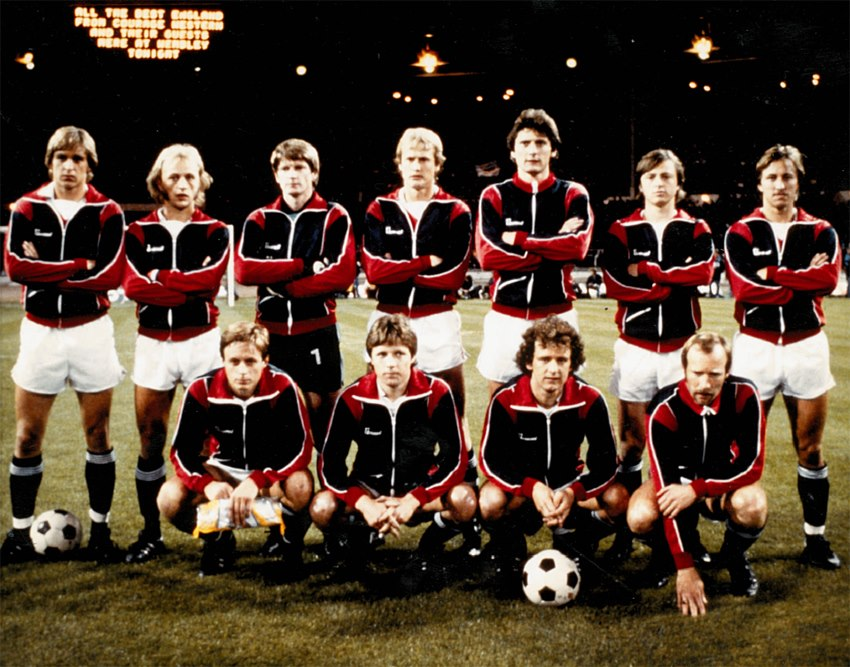 Det norske herrelandslaget i fotball anno 1980